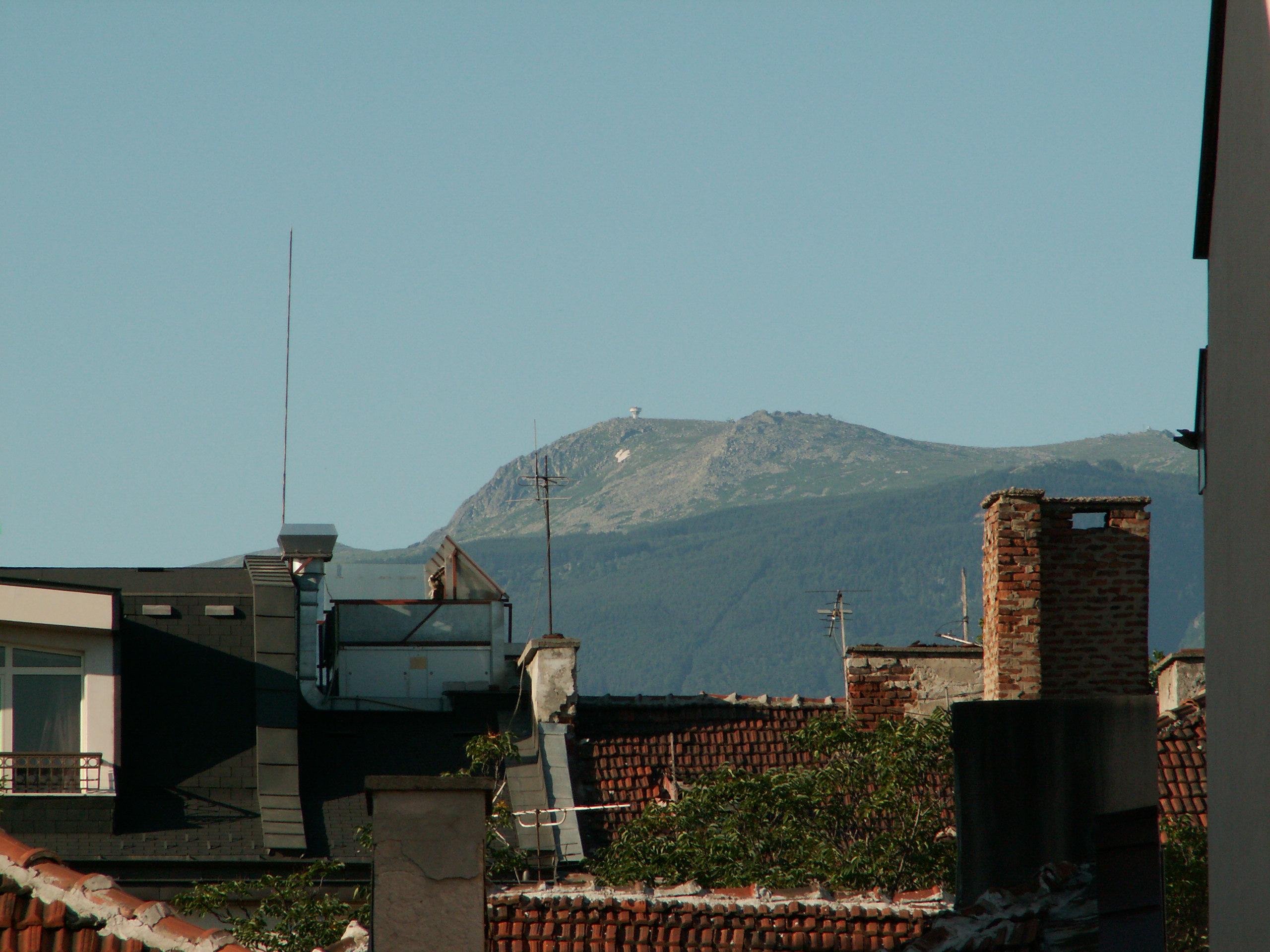 Le sommet du Vitocha au-dessus des toits de Sofia (juillet 2009)